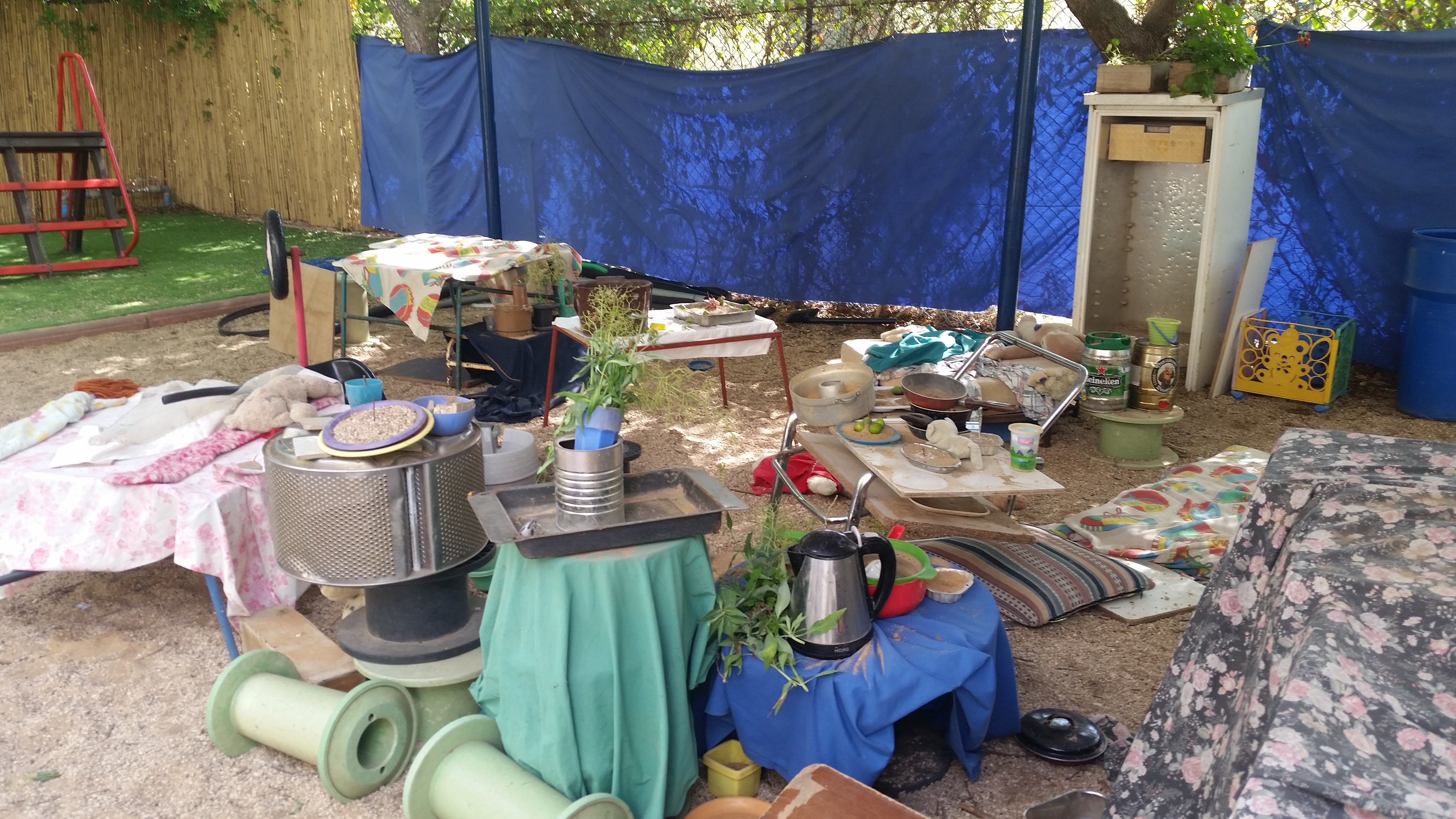 גרוטאות בחצר גן הילדים "חרוב" ביישוב הקהילתי רקפת מועצה אזורית משגב בגלילי התחתון